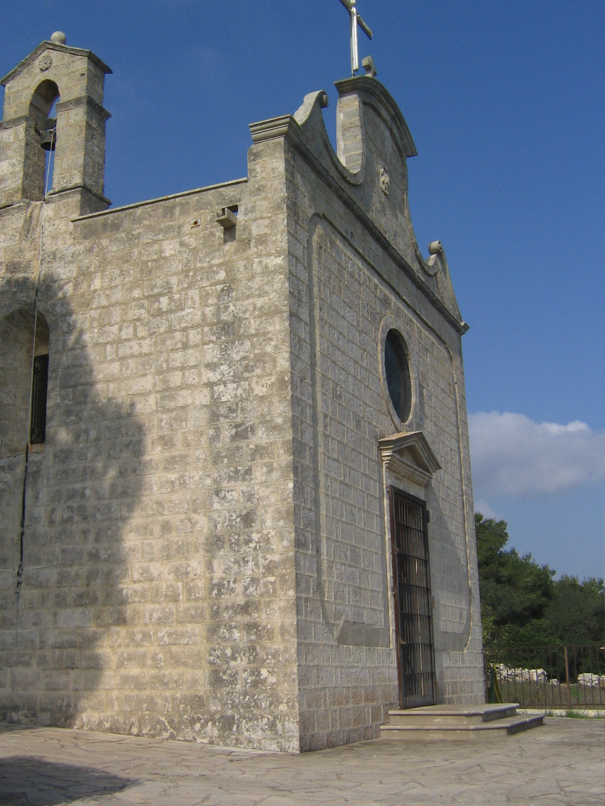 Chiesa della Madonna della Serra, Ruffano (LE)